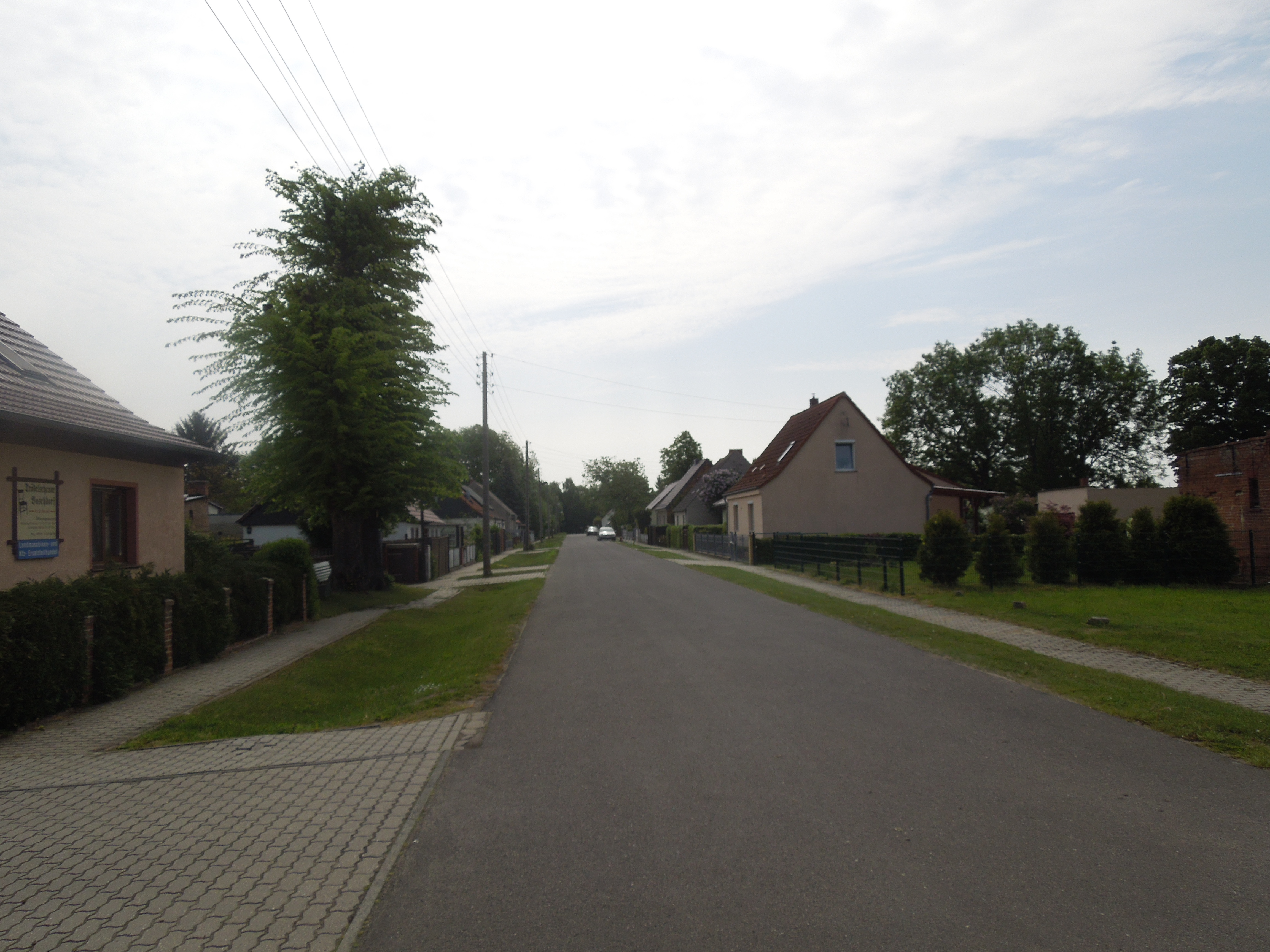 Gerickensberg, Buschdorf, im Oderbruch